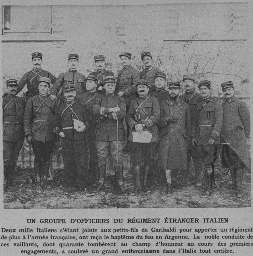 Un groupe d'officiers du régiment étranger de la Légion étrangère, au centre avec la badine le lieutenant colonel Peppino Garibaldi.